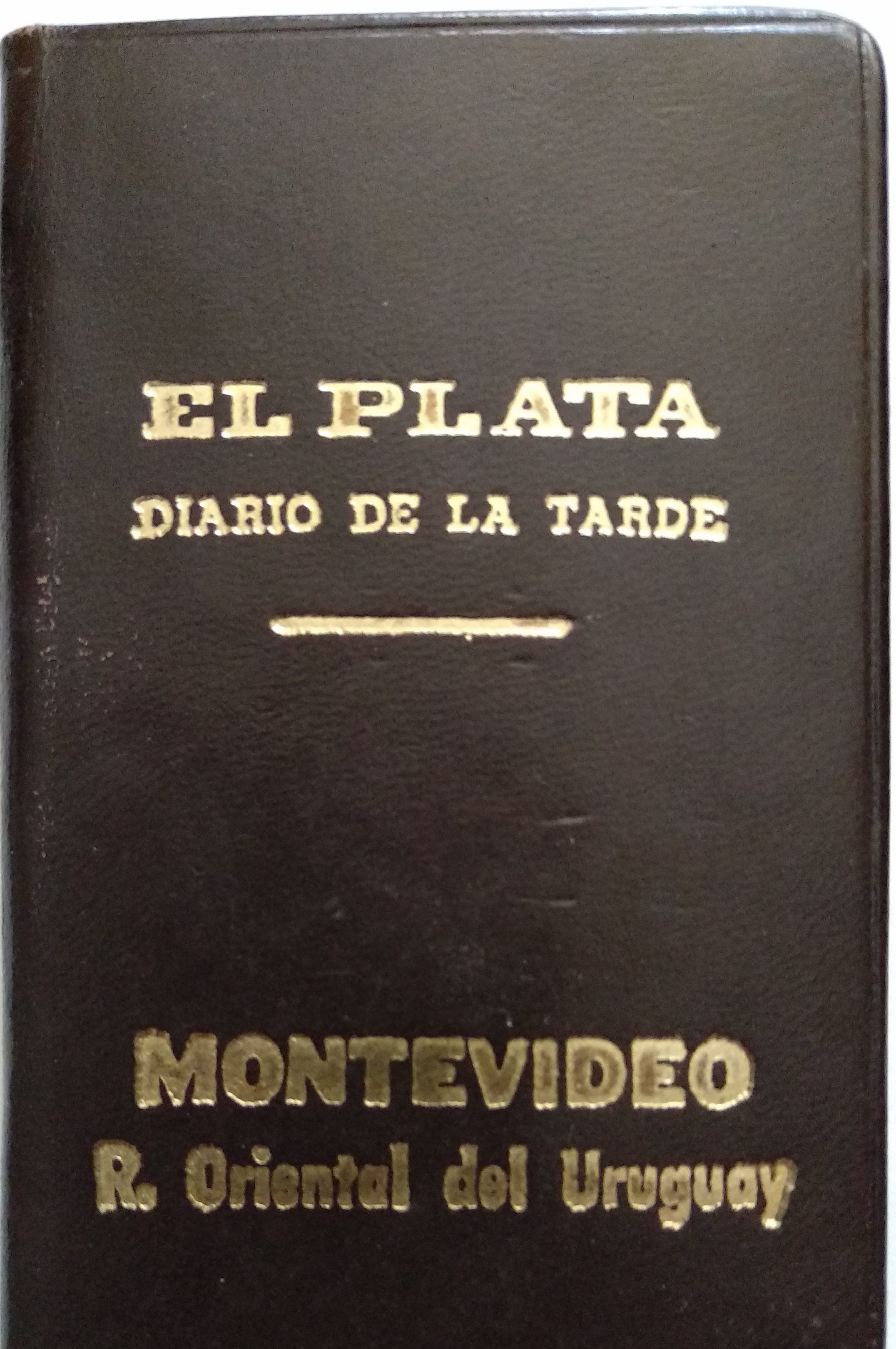 carnet de empleado de El Plata, diario de la tarde montevideo urugauy